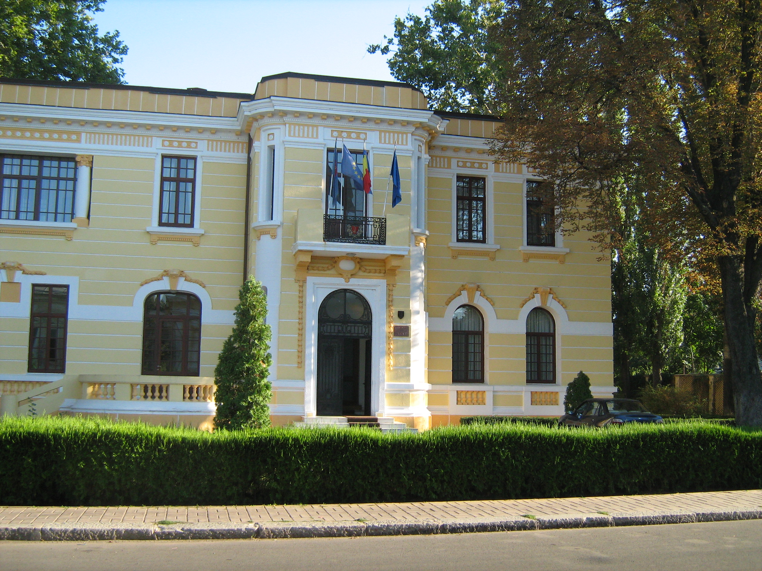 Galaţi, Fostul consulat cehoslovac